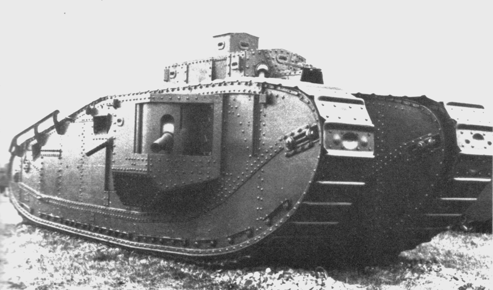 Digitale reproductie afbeelding van de officiële press release uit 1920 van het Libertytankseriemodel